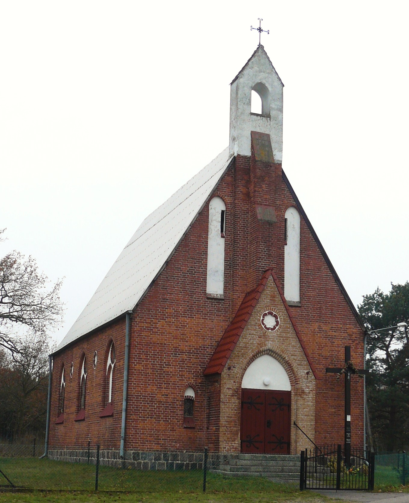 Kościół Trójcy Świętej w Dobrojewie.